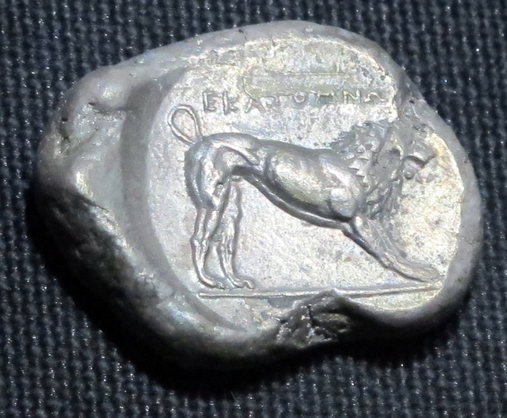 Moneta di hekatomnos, 392-377 ac.